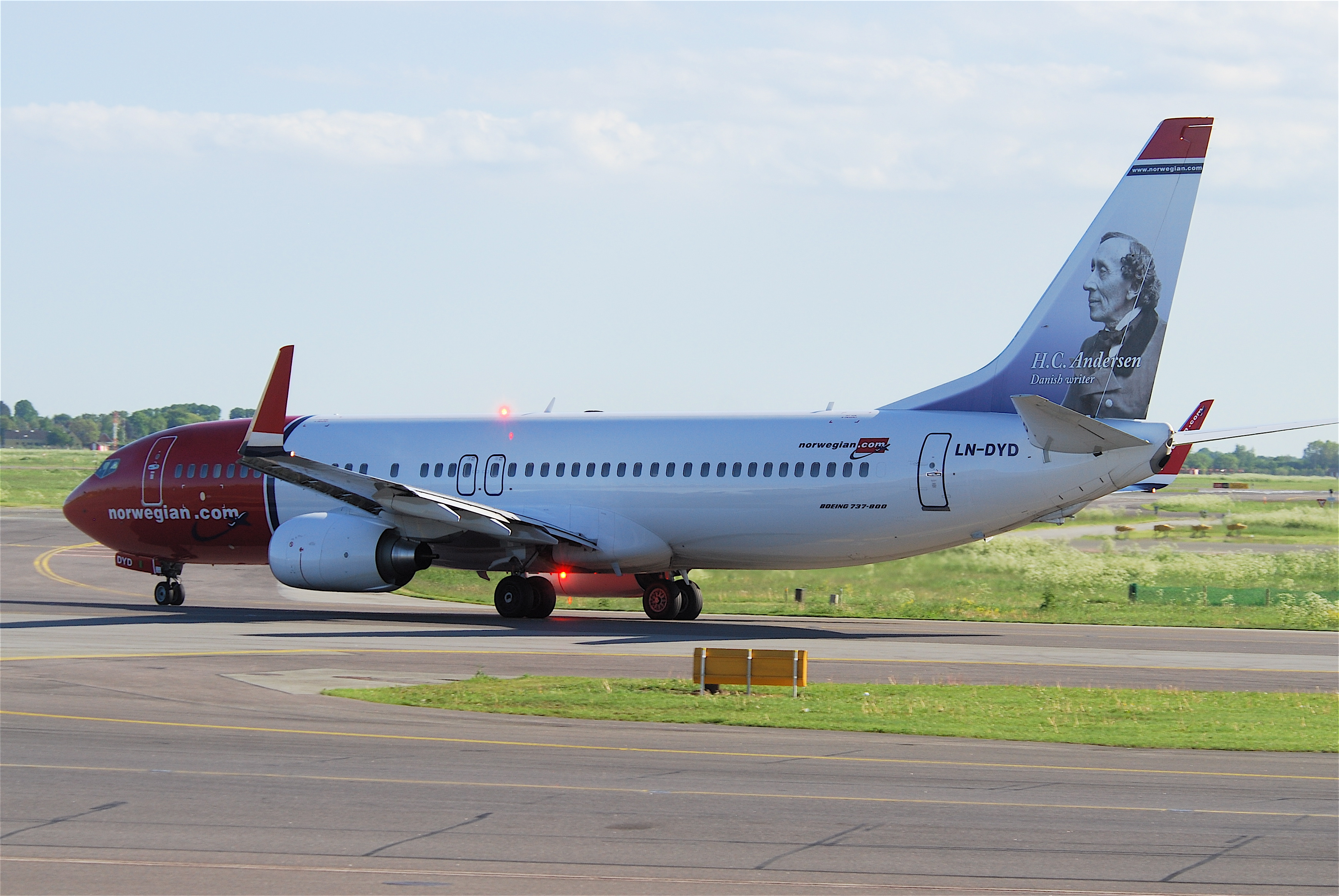 Norwegian Boeing 737-800; LN-DYD@CPH;04.06.2010/575aw